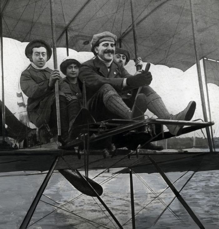 Nationaal Archief / Spaarnestad Photo, SFA022002769. De Nederlandse vliegtuigbouwer Marinus van Meel (1880-1958) lachend aan de stuurknuppel van een open vliegtuigje. Achter hem twee vrouwen en een man. Nederland, Soesterberg, 1911. Smiling Dutch aircraft constructor Marinus van Meel (1880-1958) at the control stick of an entirely open airplane. Behind him two women and a man. Soesterberg, the Netherlands, 1911. Collectie Spaarnestad Voor meer informatie en voor meer foto’s uit de collectie van Spaarnestad Photo, bezoek onze Beeldbank: U kunt ons helpen onze kennis van de fotocollecties te verrijken door tags en commentaren toe te voegen. Herkent u mensen of locaties of heeft u een bijzonder verhaal te vertellen bij één van de foto’s, laat dan een reactie achter (als u ingelogd bent bij Flickr) of stuur een mailtje naar: You can help us gain more knowledge on the content of our collection by simply adding a comment with information. If you do not wish to log in, you can write an e-mail to